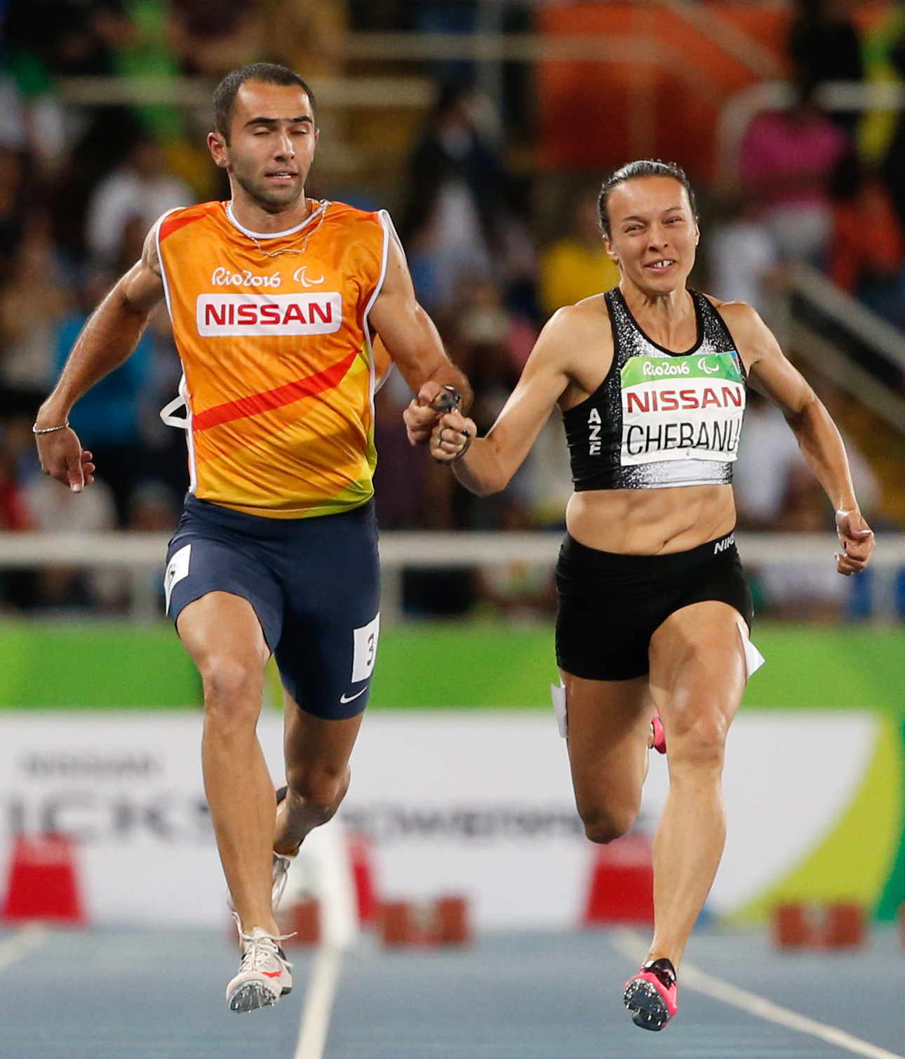 Rio de Janeiro - Elena Chebanu disputa final dos 100m T12.